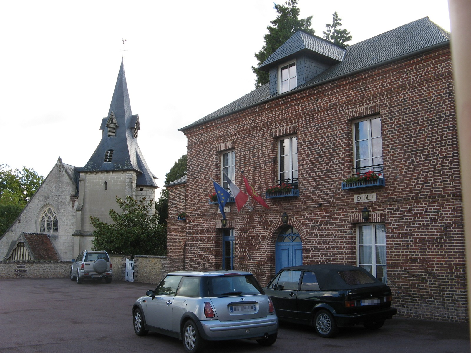 Mairie et église de Reux, France. (plaque d'immatriculation masquées)